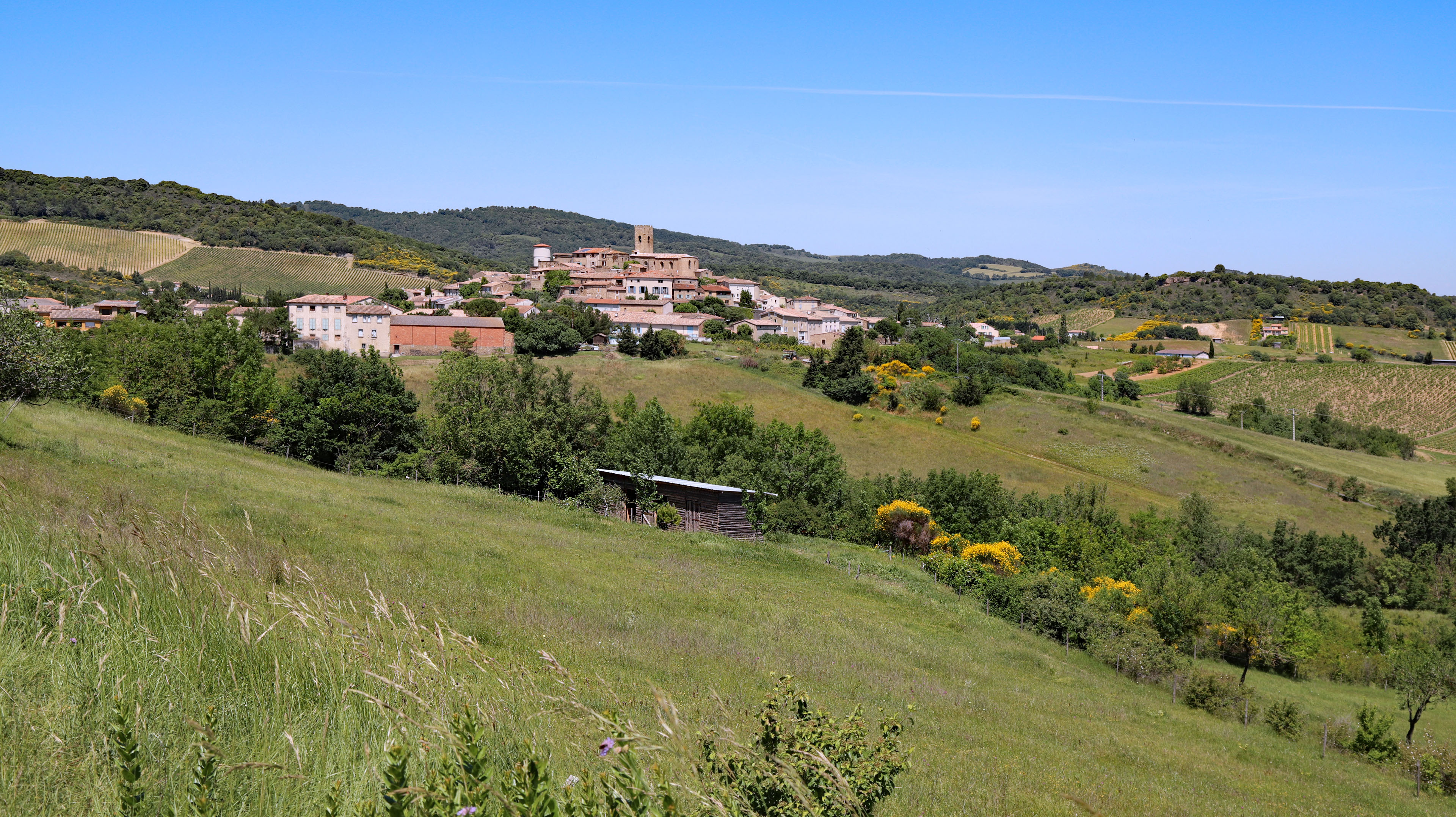 Vue du sud route de La Bezole